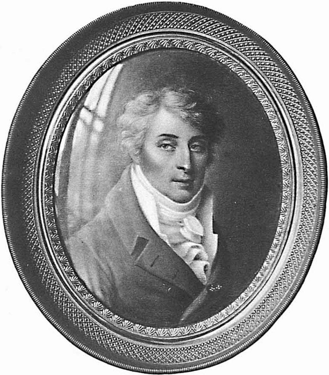 Граф Николай Александрович Толстой (1765-1816